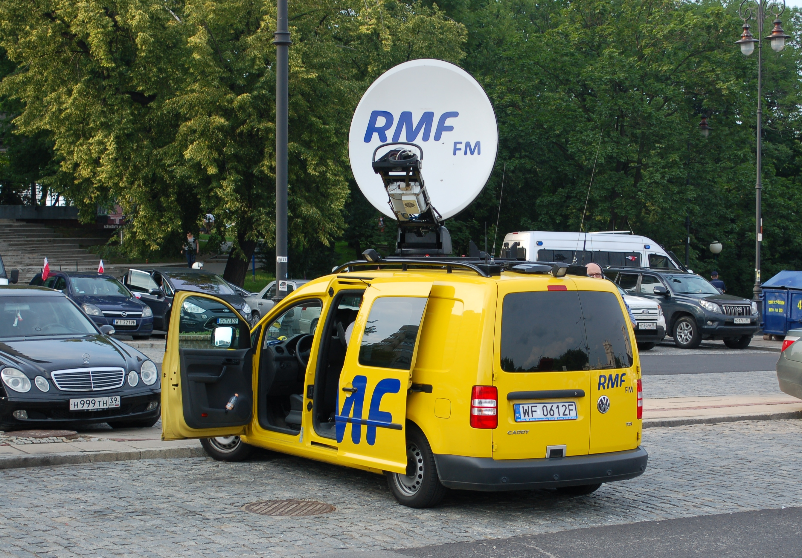 UEFA Euro 2012, Poland-Russia, 12.06.2012